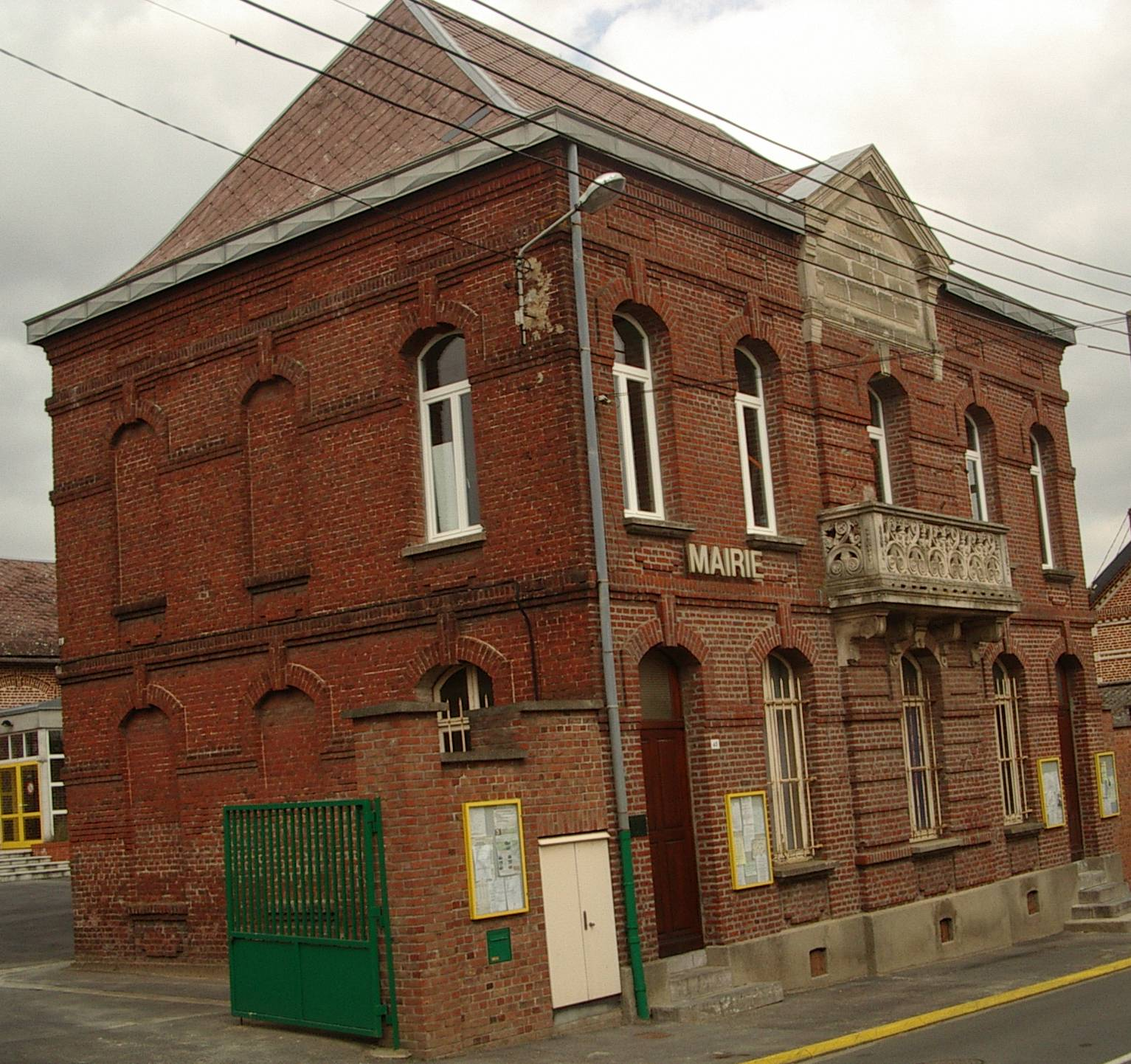 La Mairie de Saint-Vaast en Cambréis.Photo prise par J-C HOUDOT.